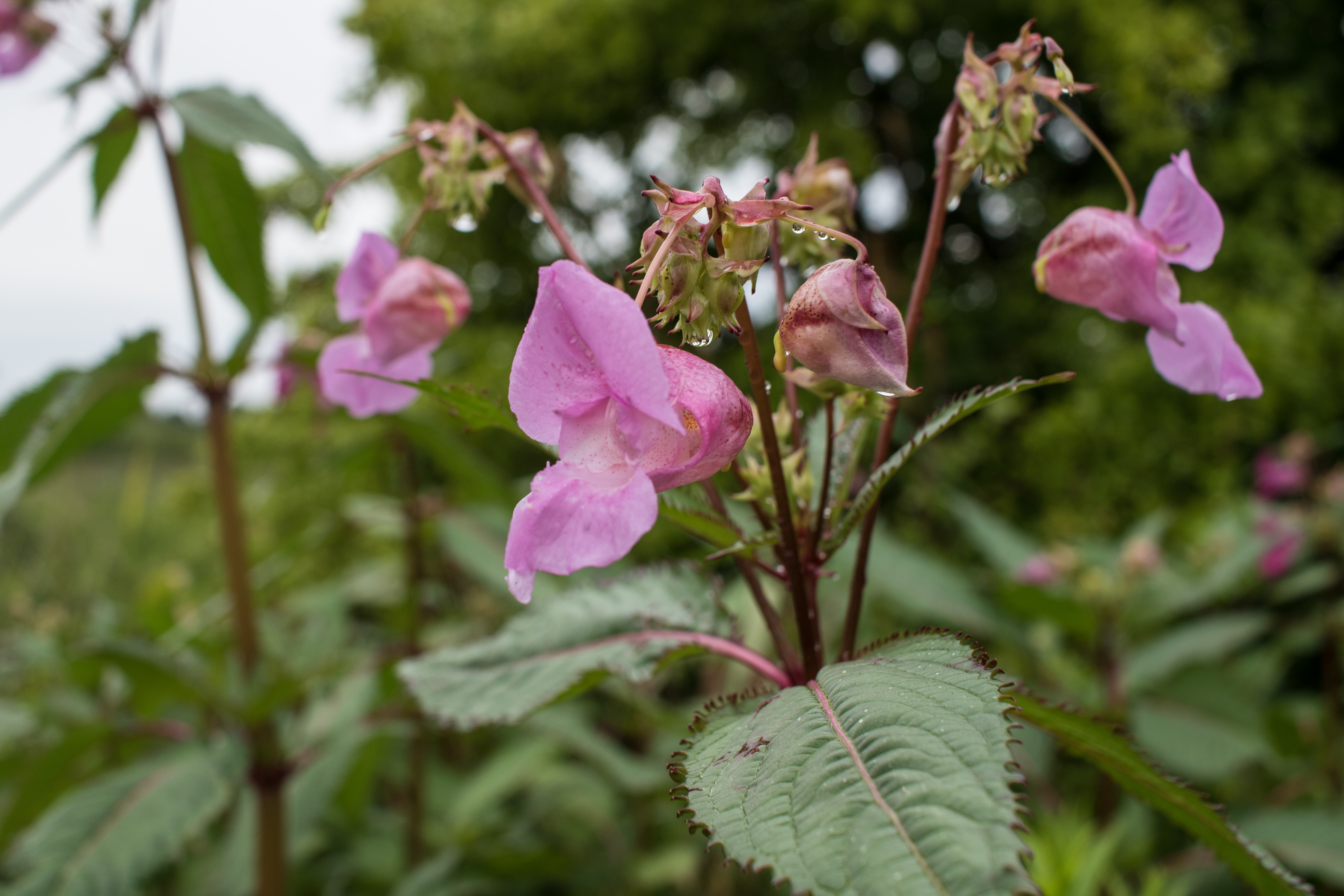 Impatiens glandulifera Royle, Utterslev Mose, Søborg, Denmark, 27 July 2015